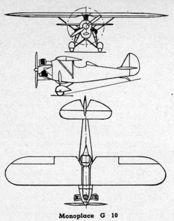 Gribovskij G-10